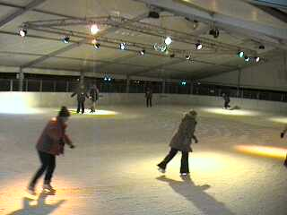 Ice-rink POSIR - "Malta" in Poznan, Poland